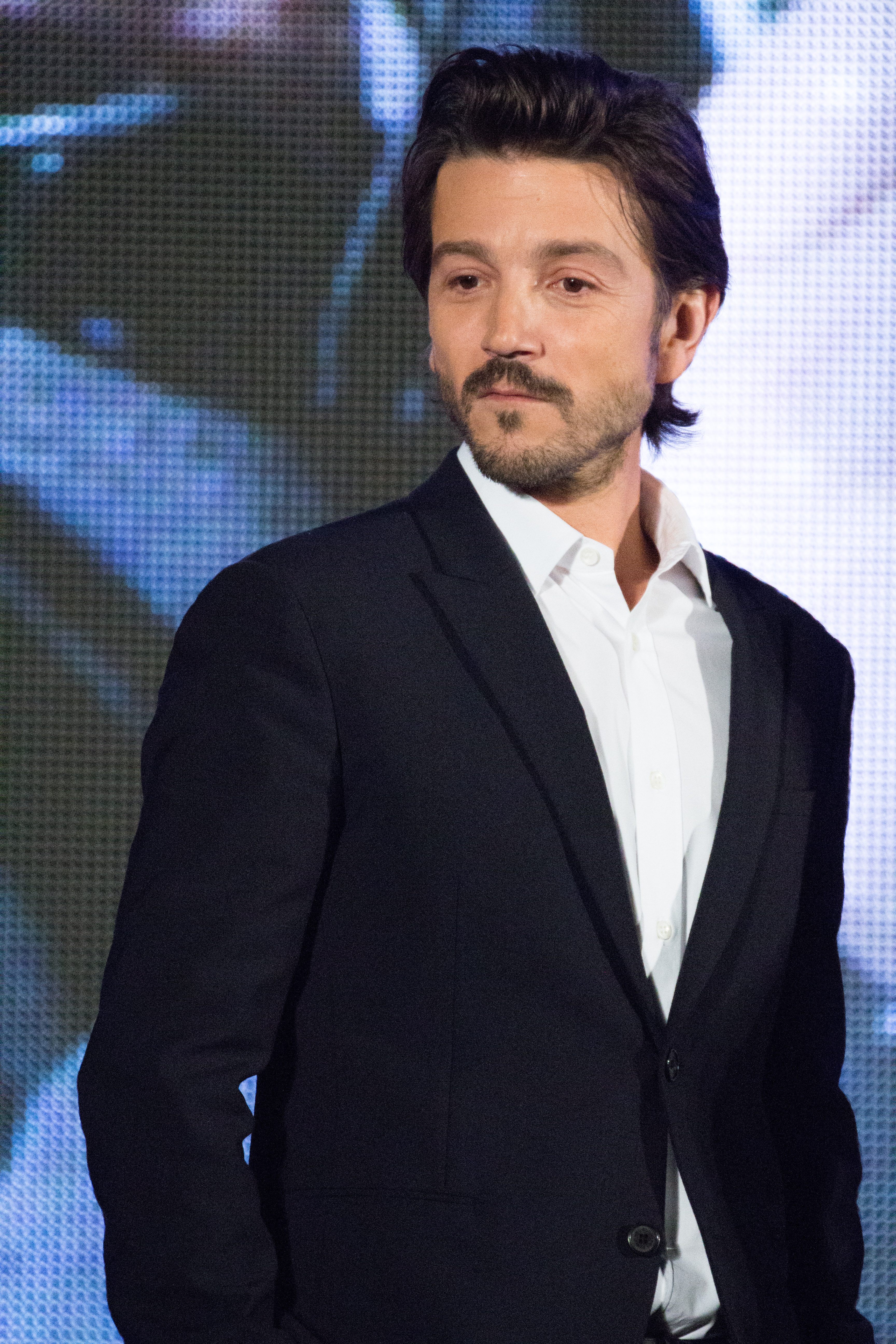 ローグ・ワン/スター・ウォーズ・ストーリー ジャパン・プレミア レッドカーペット ディエゴ・ルナ